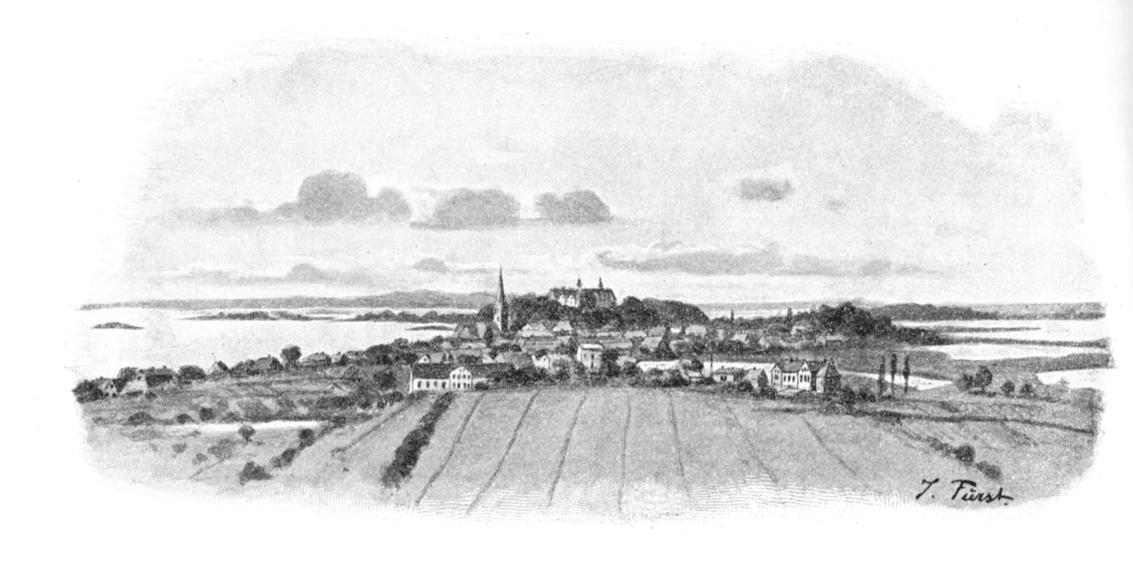 Blick auf Plön um 1895, gezeichnet von Julius Fürst